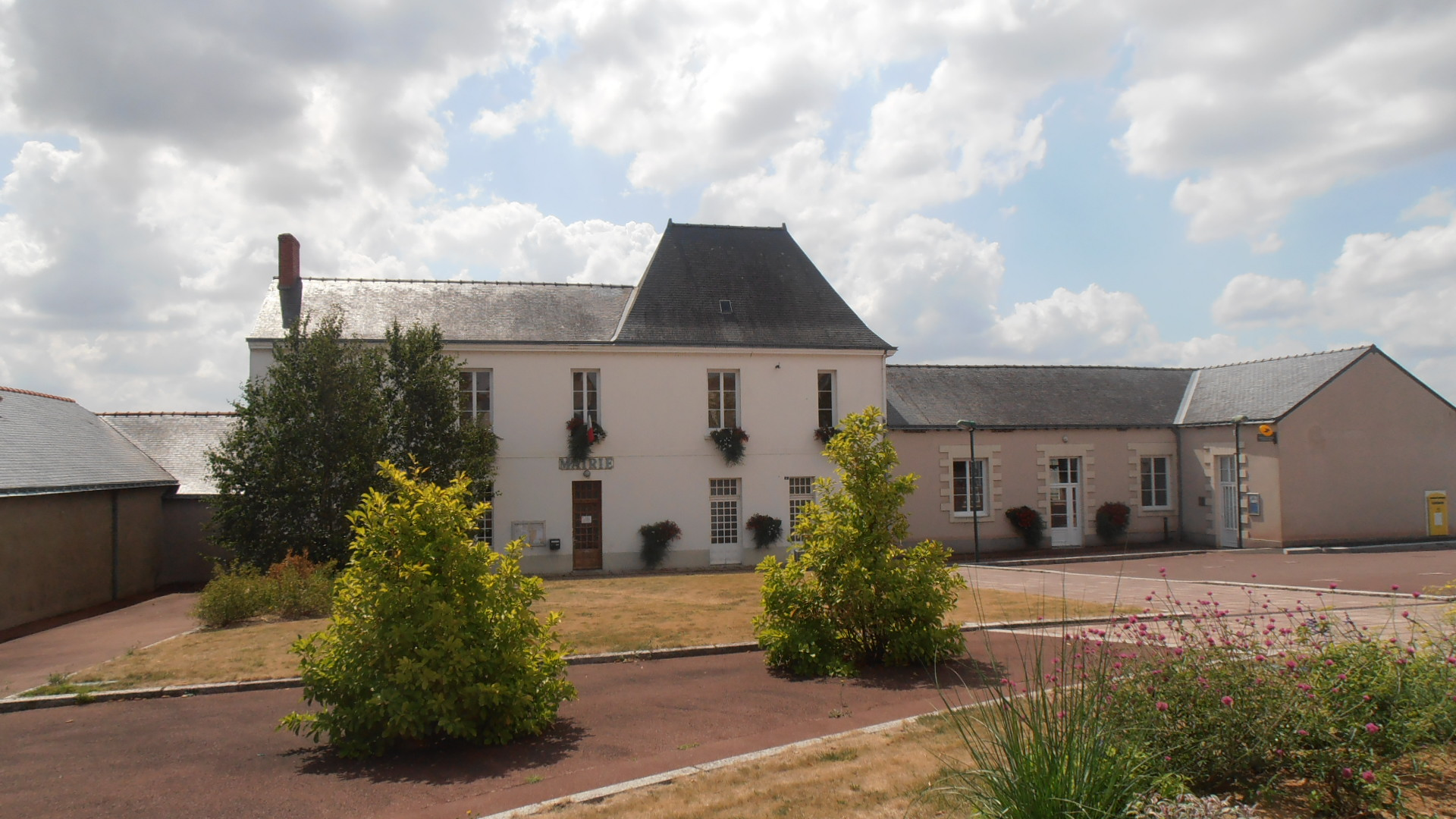 La mairie de Saint Herblon